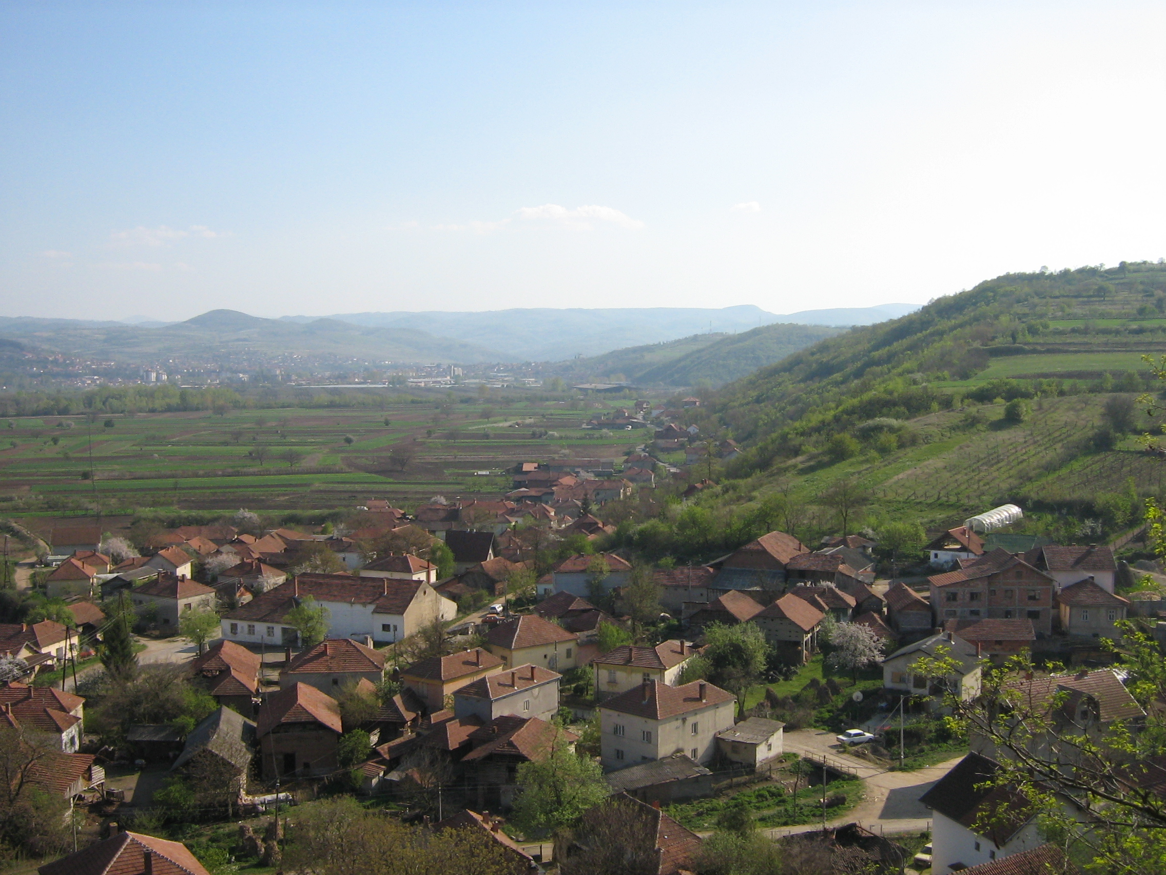 Štipina